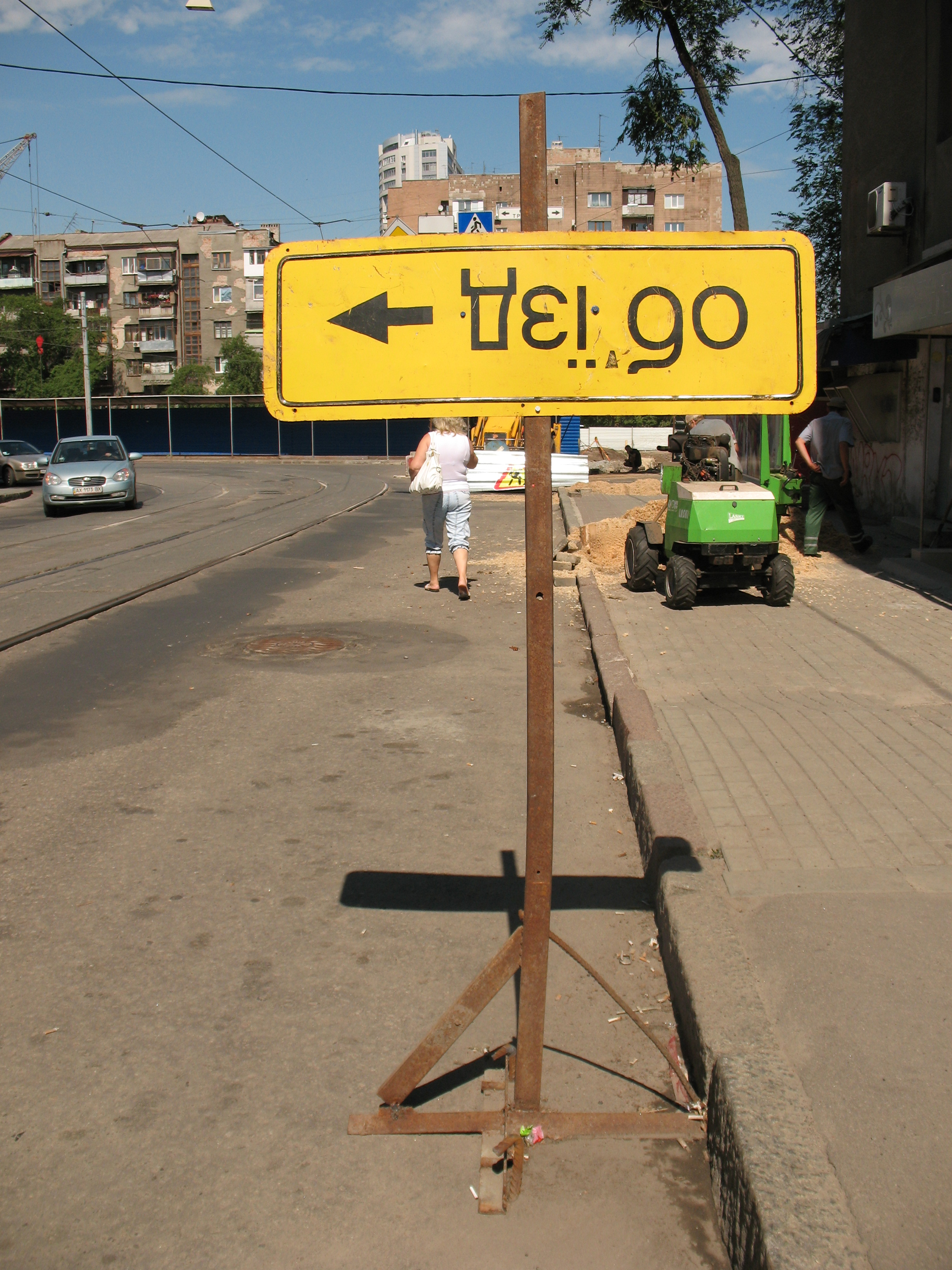 Kharkov. Roadworks.